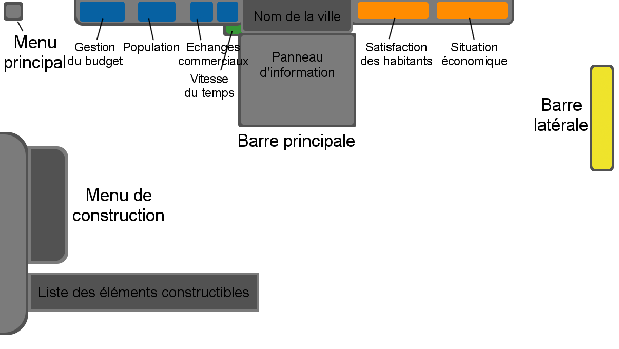 Représentation de l'interface du jeu vidéo Cities XL.